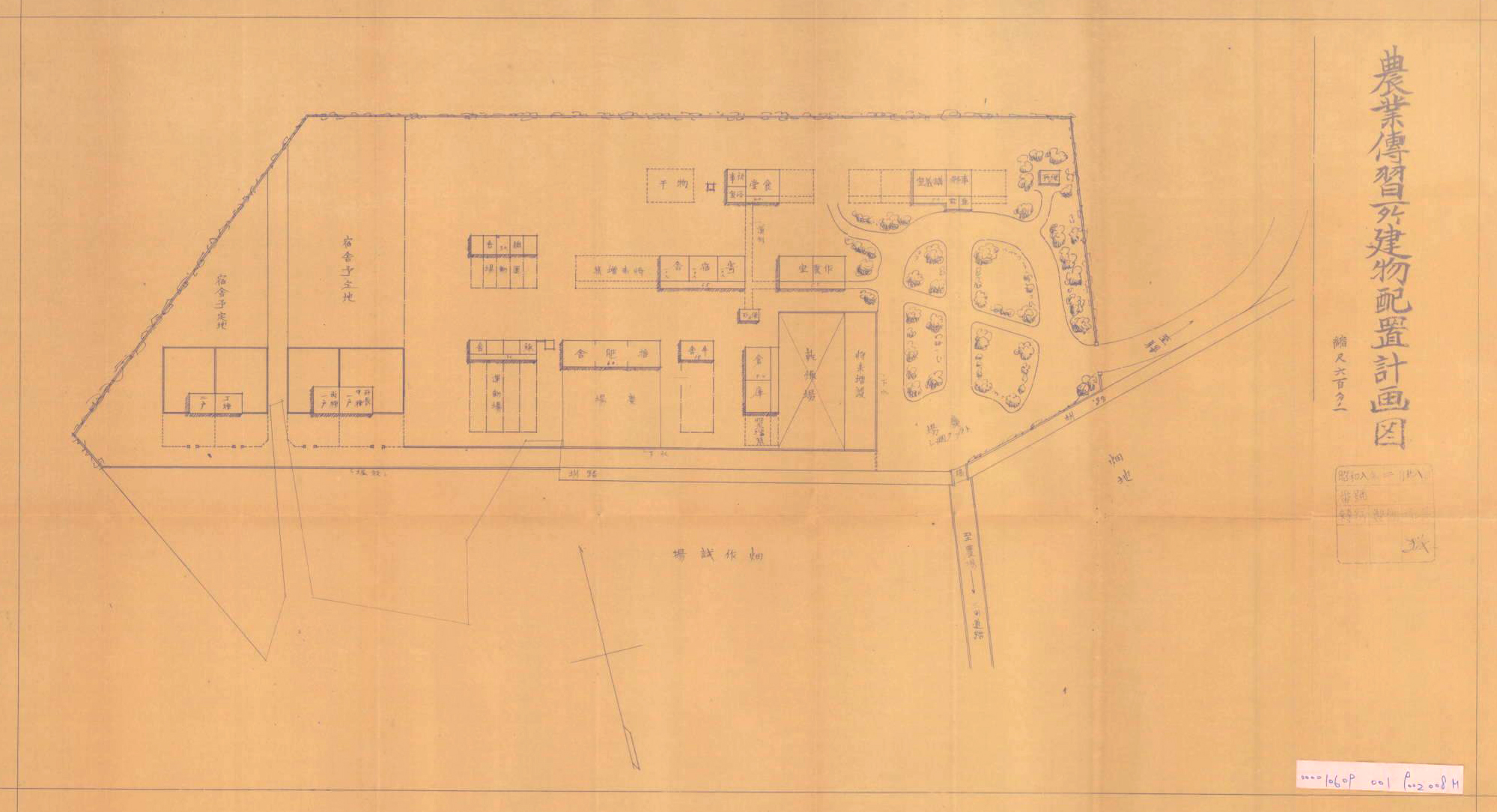 中文（台灣）: 1933年設立於新竹州竹南郡竹南街的農業教育機構